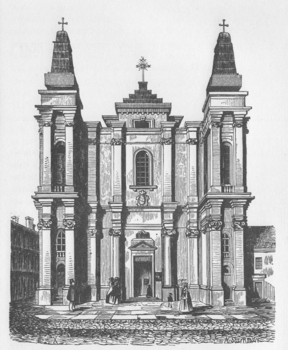 Kościół Franciszkanów ul. Zakroczymska w Warszawie